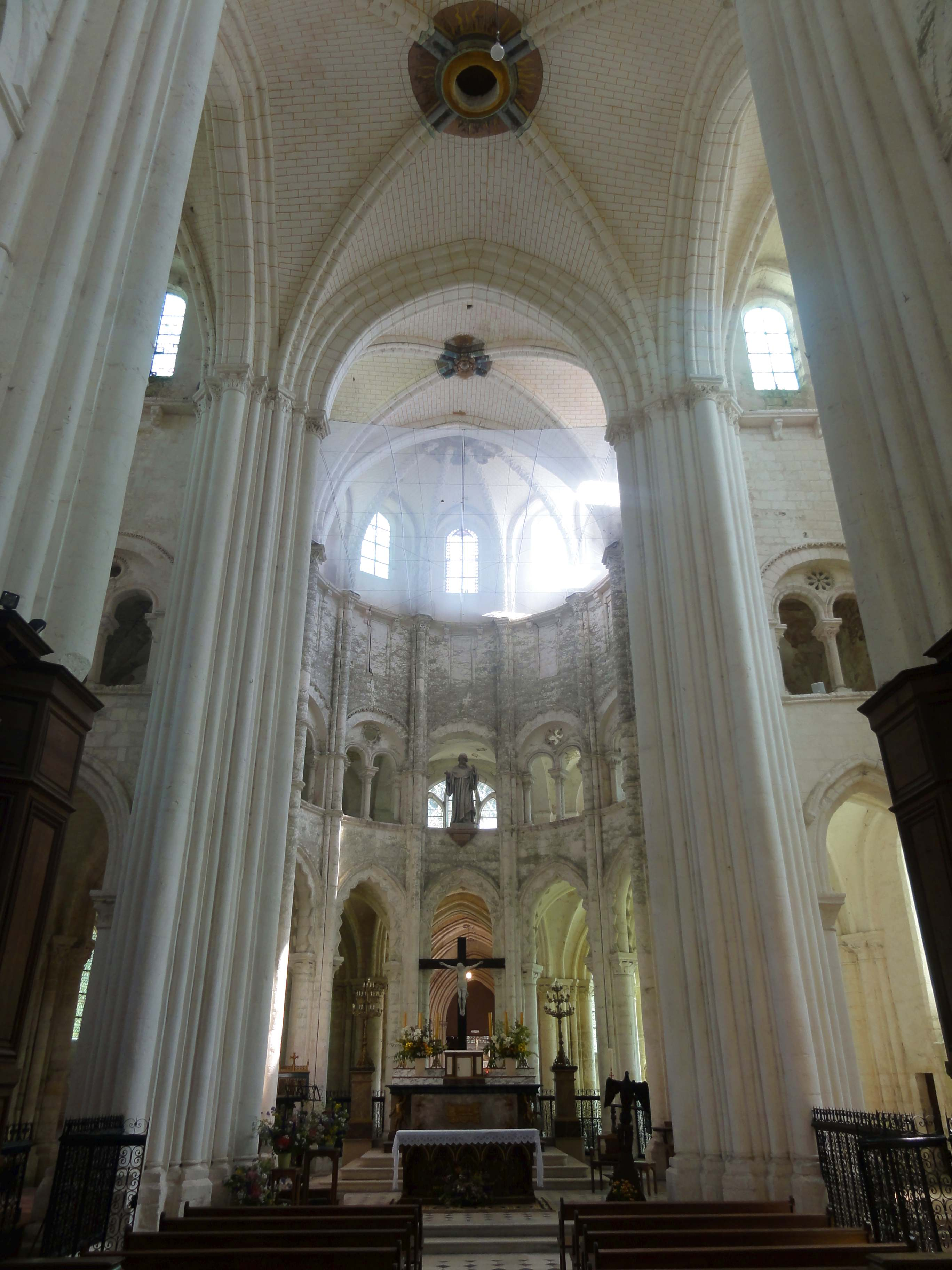 Transept de l'abbatiale - voir le titre du fichier.